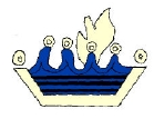 Glifo Náhuatl del municipio de Huichapan,Hidalgo